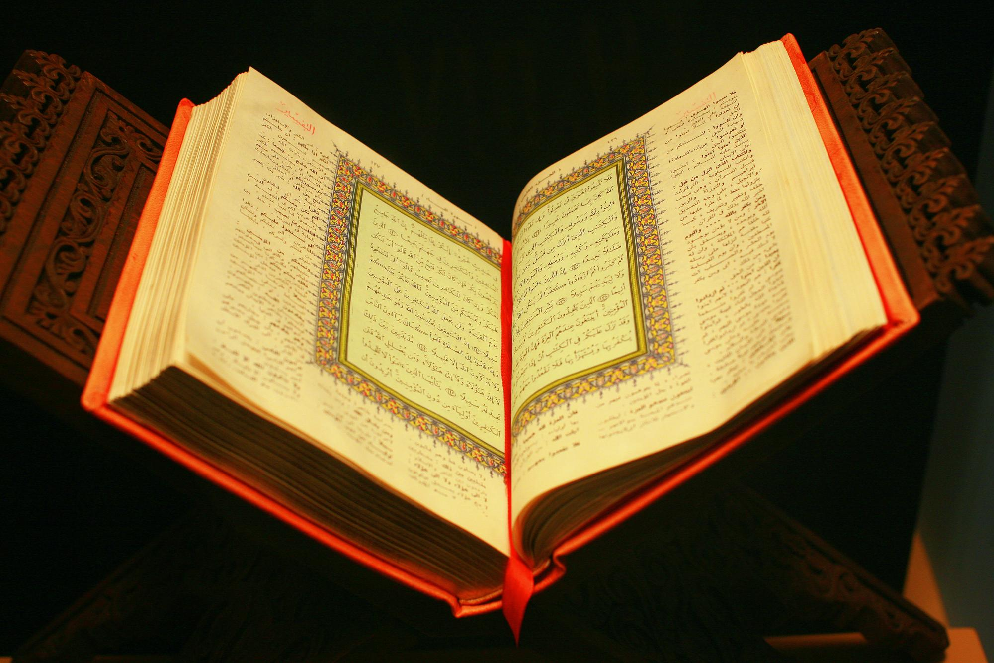 القرآن في متحف التاريخ الطبيعي في نيويورك